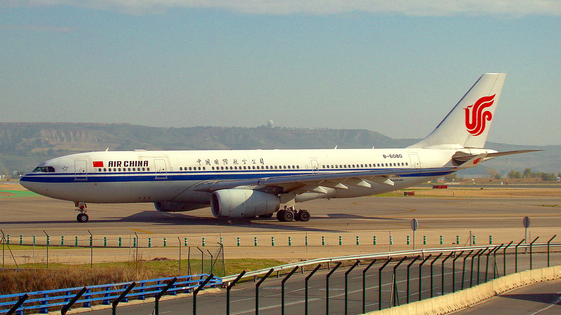 Airbus A330-243 (B-6080) de Air China en el aeropuerto Adolfo Suárez Madrid-Barajas.